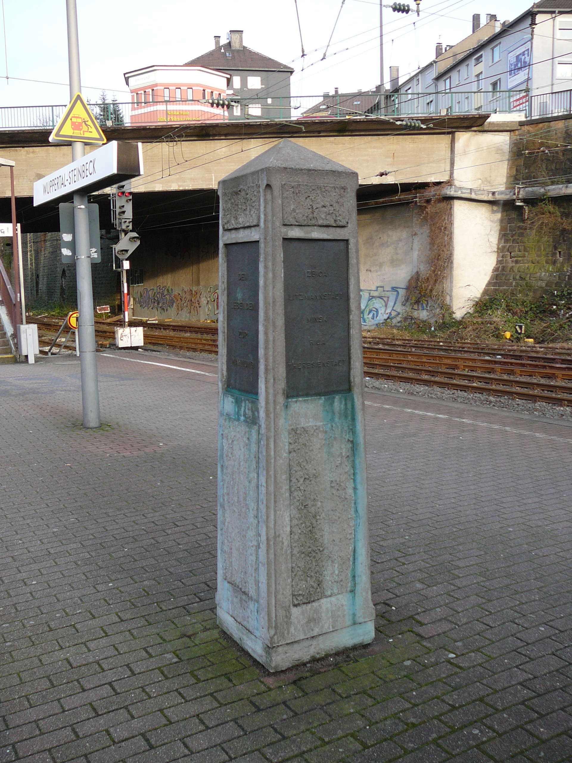 Arrenberg, Wuppertal